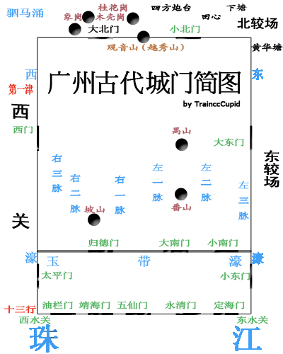 广州古代城门简图